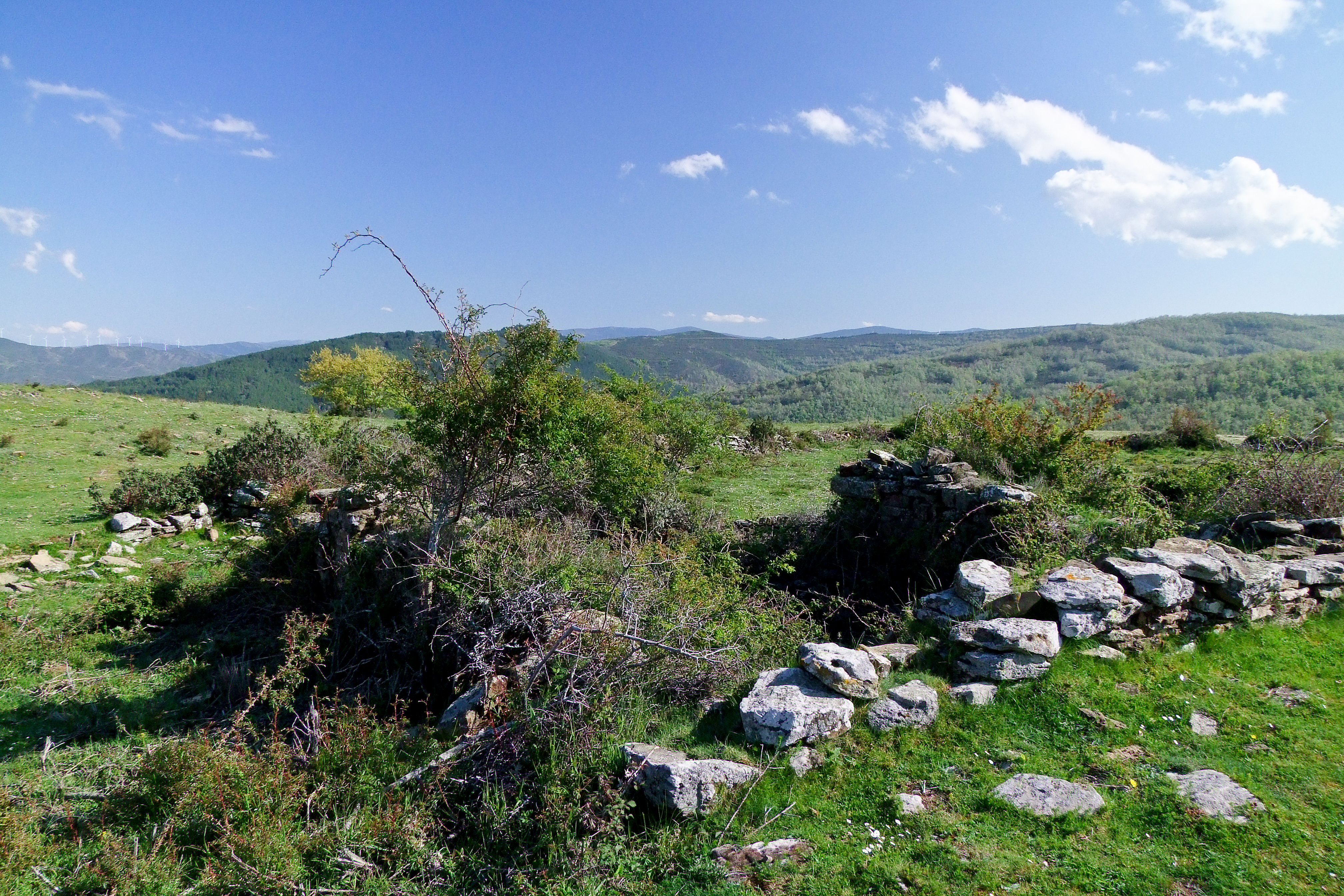 Ermita de Santa Elena en la localidad de El Collado, La Rioja - España